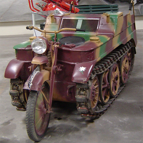 SdKfz 2 "Kettenkrad" in Musée des Blindés - Saumur. Picture taken by Mr. Vreeburg.